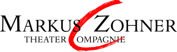 Das Logo der Markus Zohner Theater Compagnie seit 1992, erscheint weltweit auf allen Drucksachen, Veröffentlichungen und Webseiten der Compagnie